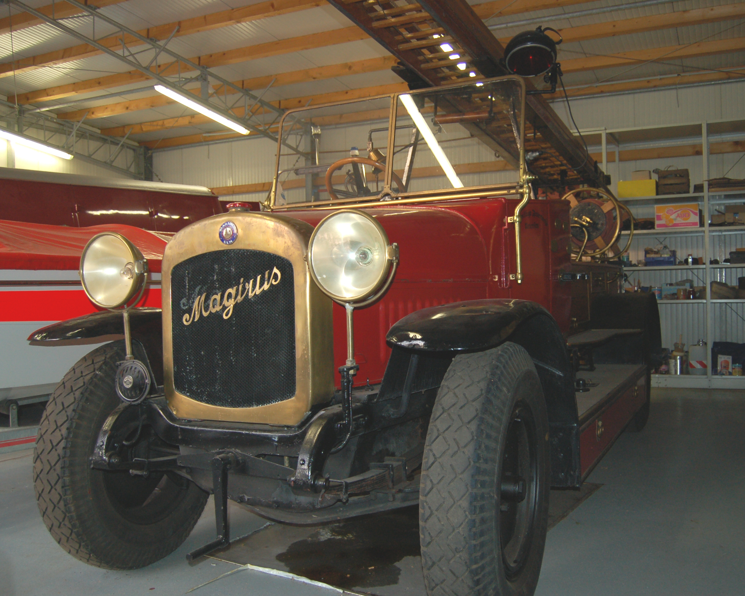 Feuerwehrfahrzeug Magirus Bayern (Codewort "Ruminator") 16,2 PS Motorsteuerleistung 32 PS Bremsleistung Baujahr: 14.05.1923 Sitzplätze: 6 Feuerlöschpumpe: Magirus Z1 1000l/min Besondere Ausstattung: Abprotzhaspel, zwei tragbare Schlauchhaspel, Schiebeleiter und Signalglocke.